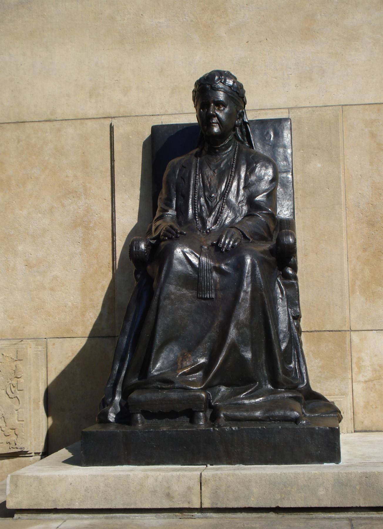 Den Haag, Josef Israëlsplein. Monument koningin-moeder Emma van Toon Dupuis en Co Brandes. The Hague/The Netherlands. Bronzen gereconstrueerd afgietsel door Ton Mooy van het oorspronkelijke beeldhouwwerk door Toon Dupuis